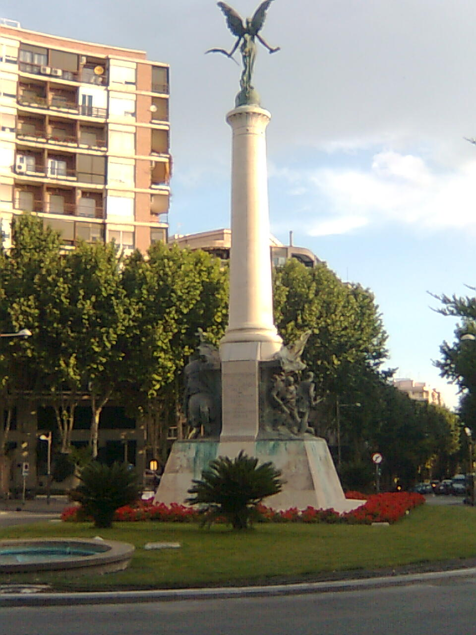 Imagen de la Plaza de las Batallas en Jaén, monumento conmemorativo a las batallas de Bailén y Las Navas de Tolosa